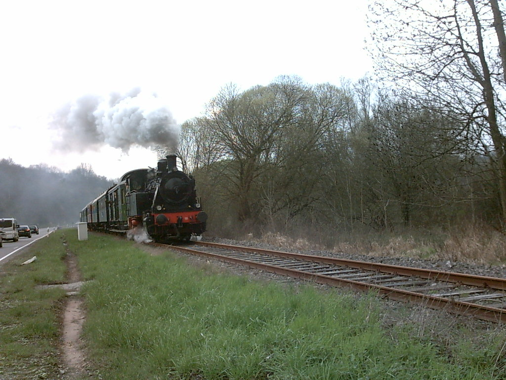 Dampflokzug aus dem Losheimer Eisenbahnmuseum